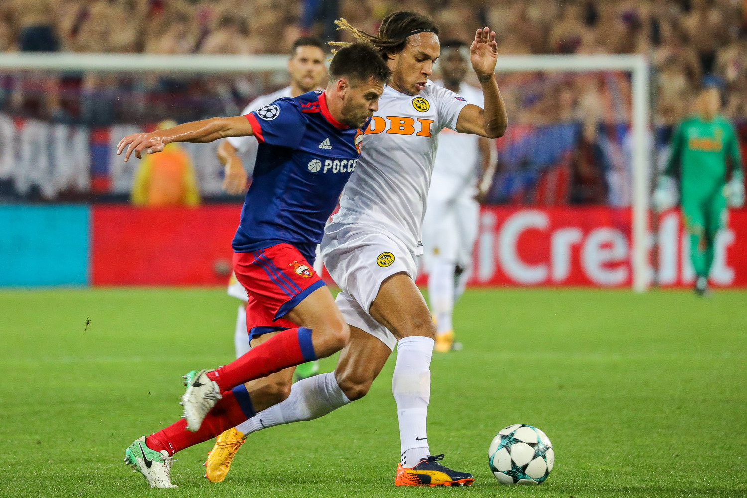 Kevin Mbabu im Laufduell gegen Georgi Schtschennikow beim CL-Quali-Match der BSC Young Boys beim ZSKA Moskau